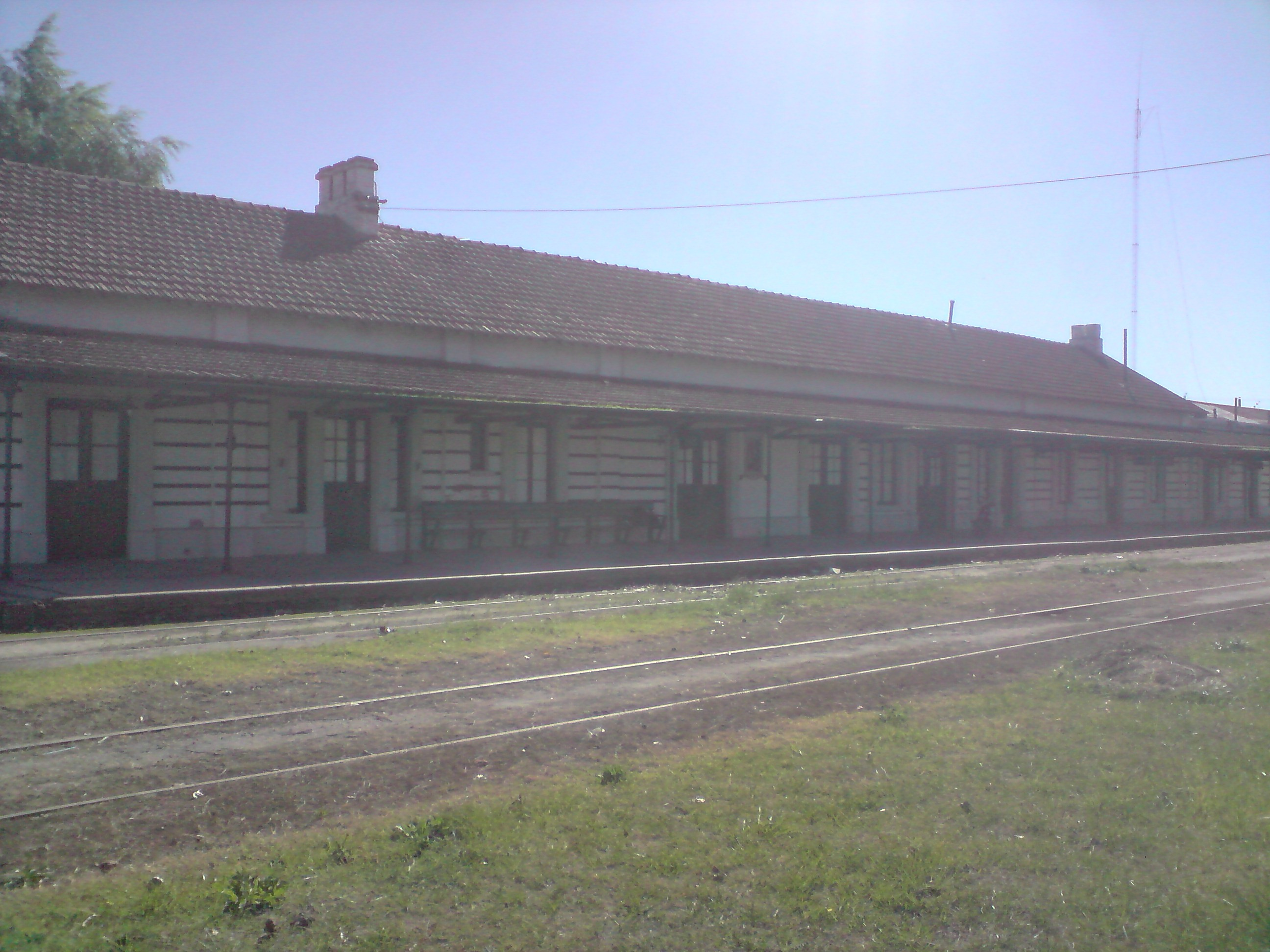 Estacion Ayacucho.